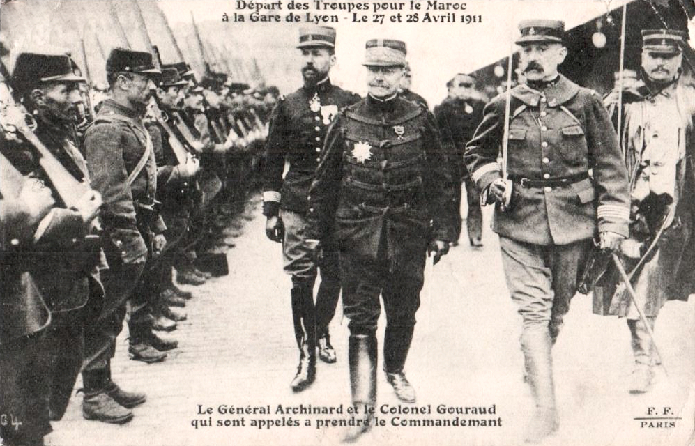 Général Archinard et colonel Gouraud, départ des troupes pour le Maroc, 1911